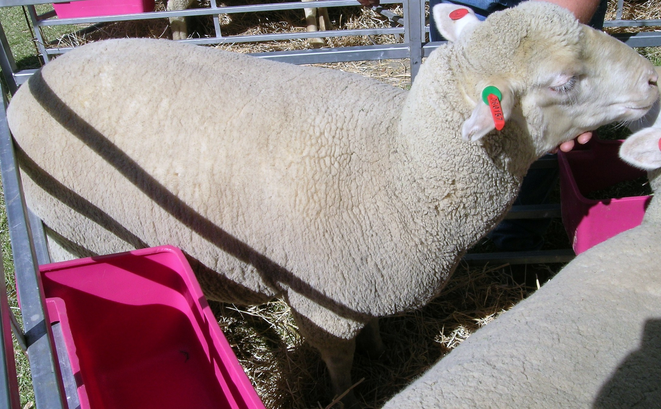 SAMM ewe, Wool Expo, Armidale, NSW